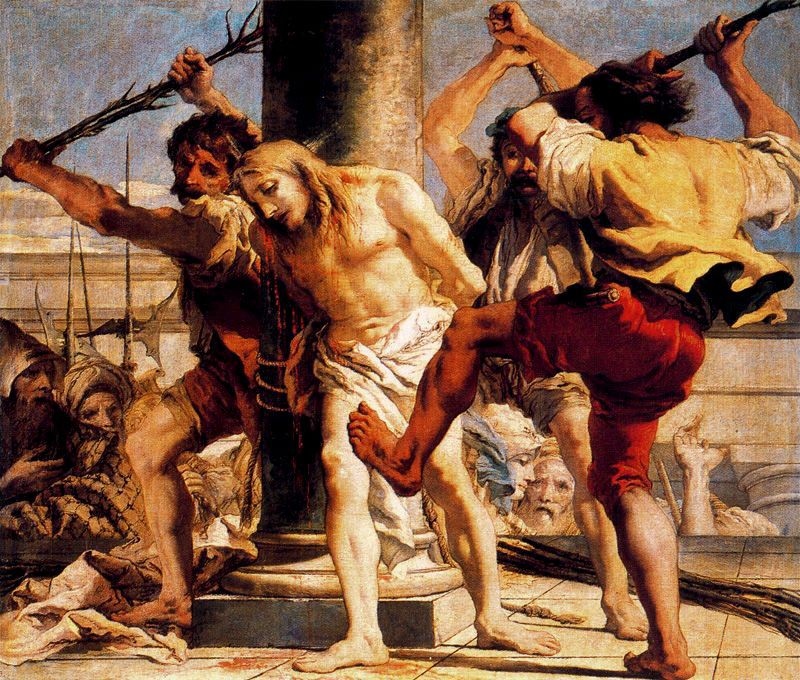 Flagellazione